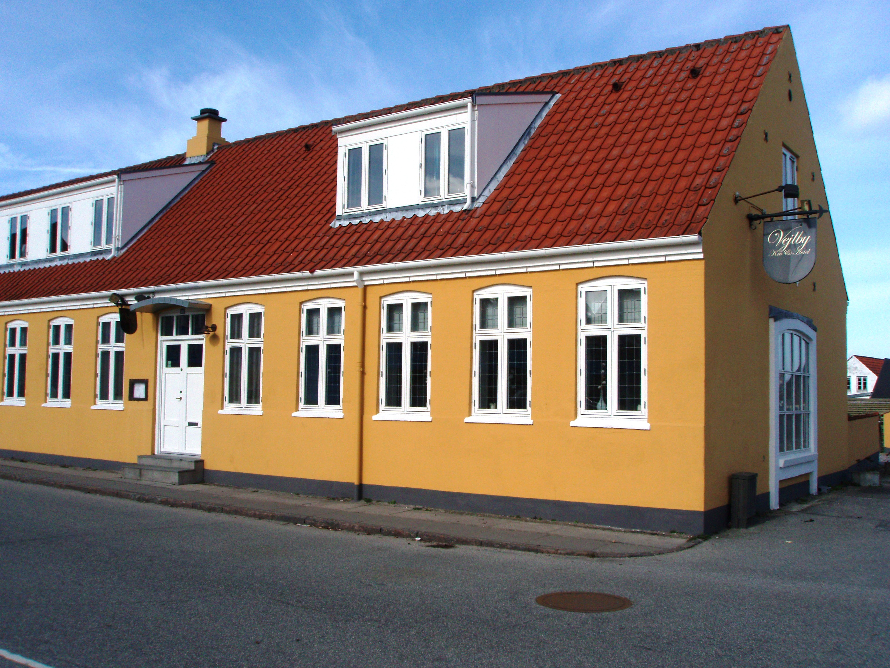 Gammel Vejlby Kro